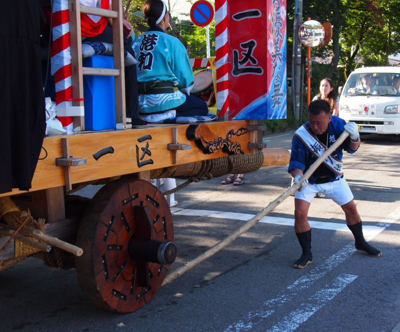 Tsuchizaki-Shinmeisha-Shrine Annual Celebration And The Float Festival (Akita City, Japan)